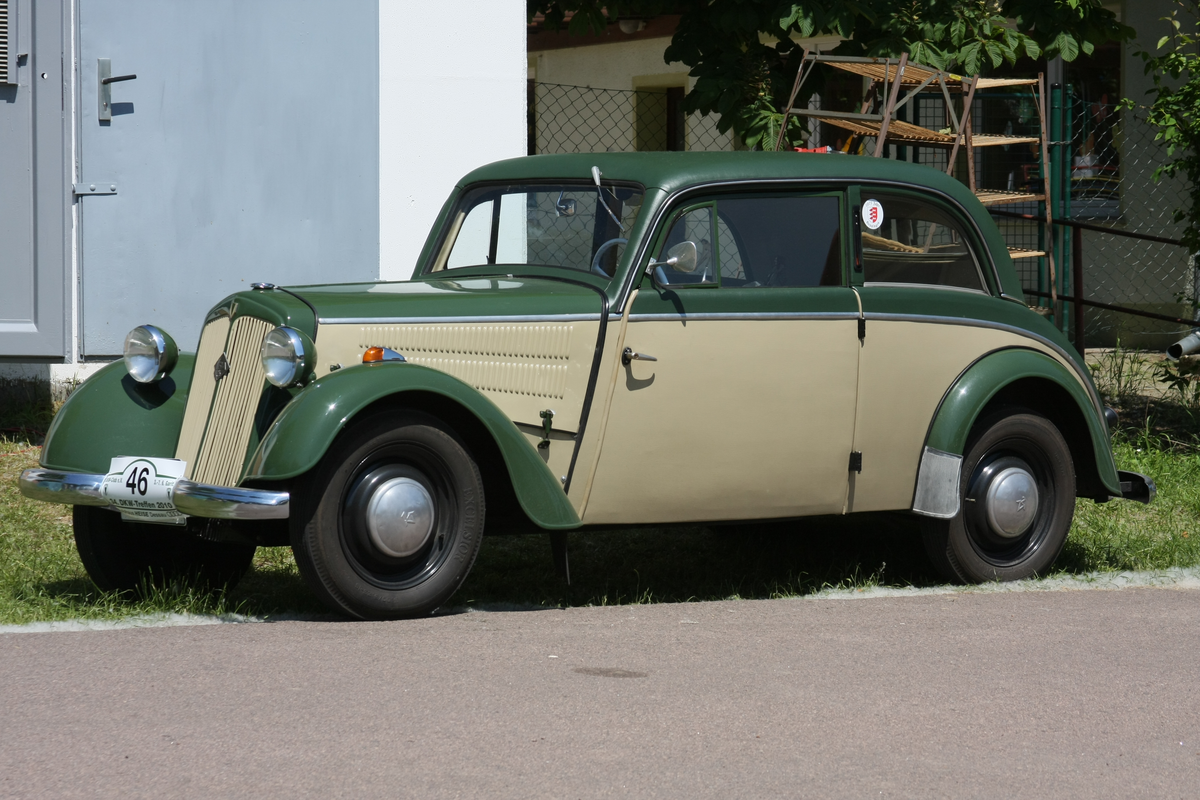 34. DKW-Treffen in Garitz 2010